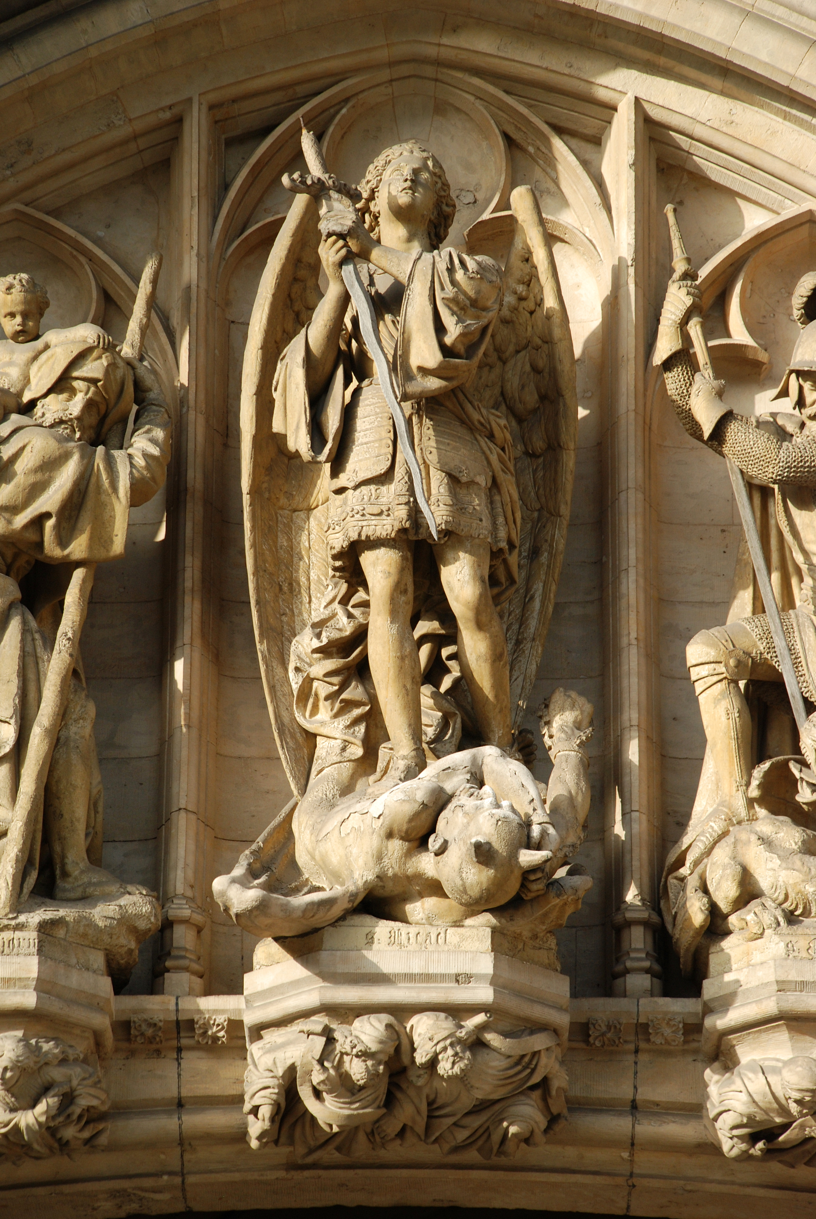 Belgique - Bruxelles - Hôtel de ville de Bruxelles - Portail - Tympan - saint Michel